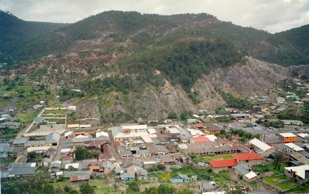 VISTA PANORAMICA DEL CENTRO DE GUADALUPE Y CALVO, TOMA DEL PUEBLO DESDE LA PARTE OESTE